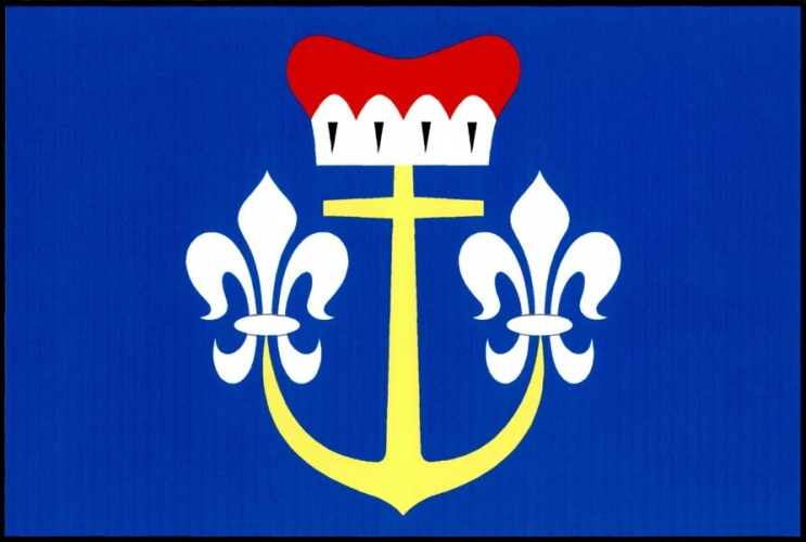 vlajka, Vraclav, okres Ústí nad Orlicí